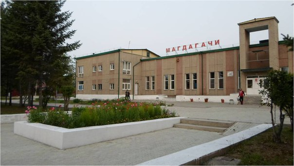 Железнодорожный вокзал на станции Магдагачи